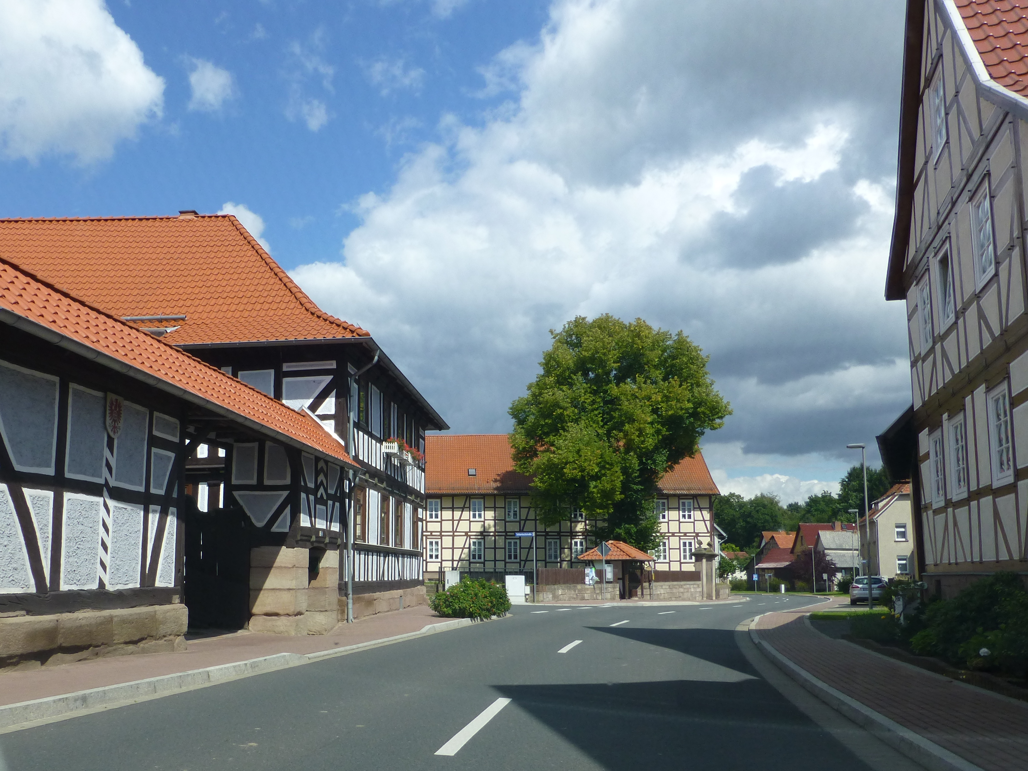 Lenterode Ortsansicht